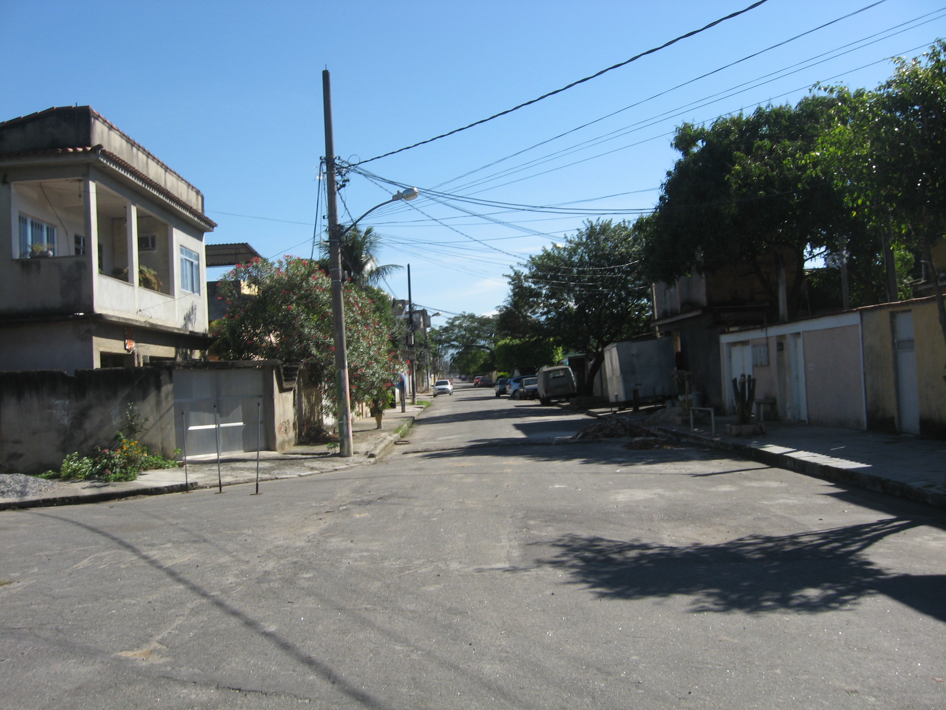 Vista de Édson Passos, bairro de Mesquita, RJ.